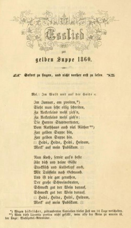 Text zu einem Lied für das Festmahl der Gelben Suppe in Leipzig